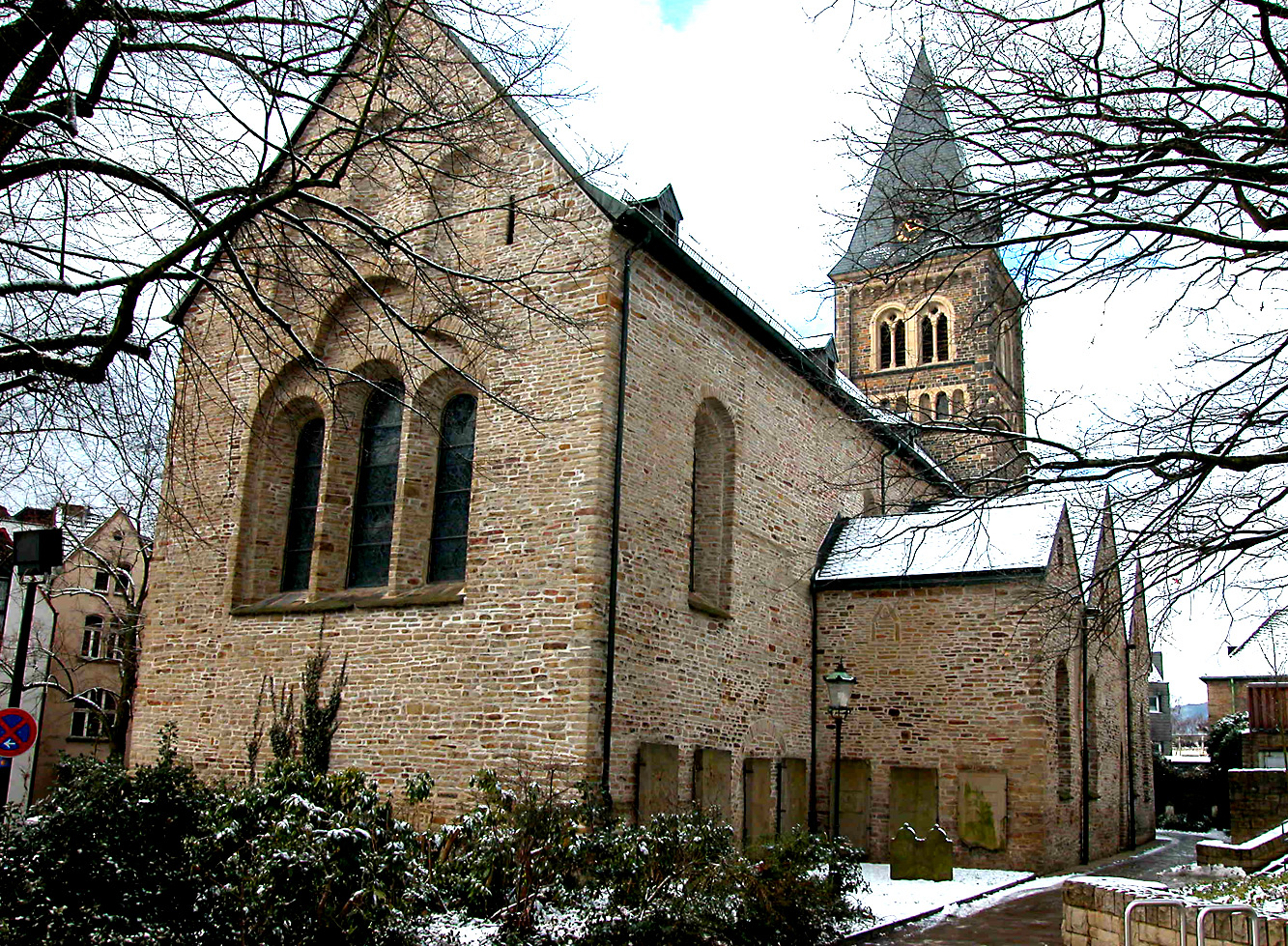 Ehemalige Stifts, heute evangelische Pfarrkirche von Herdecke